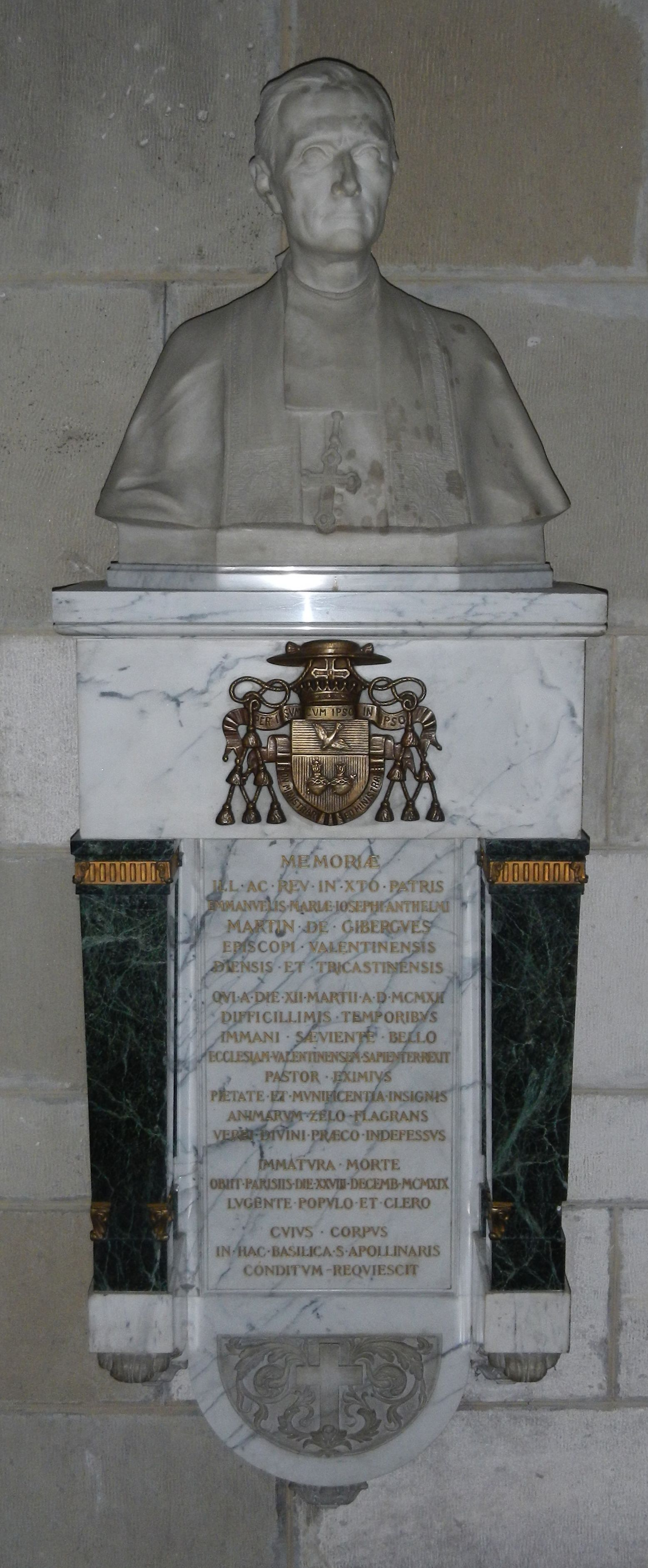 Buste de Martin de Gibergues dans la cathédrale saint Apollinaire de Valence.